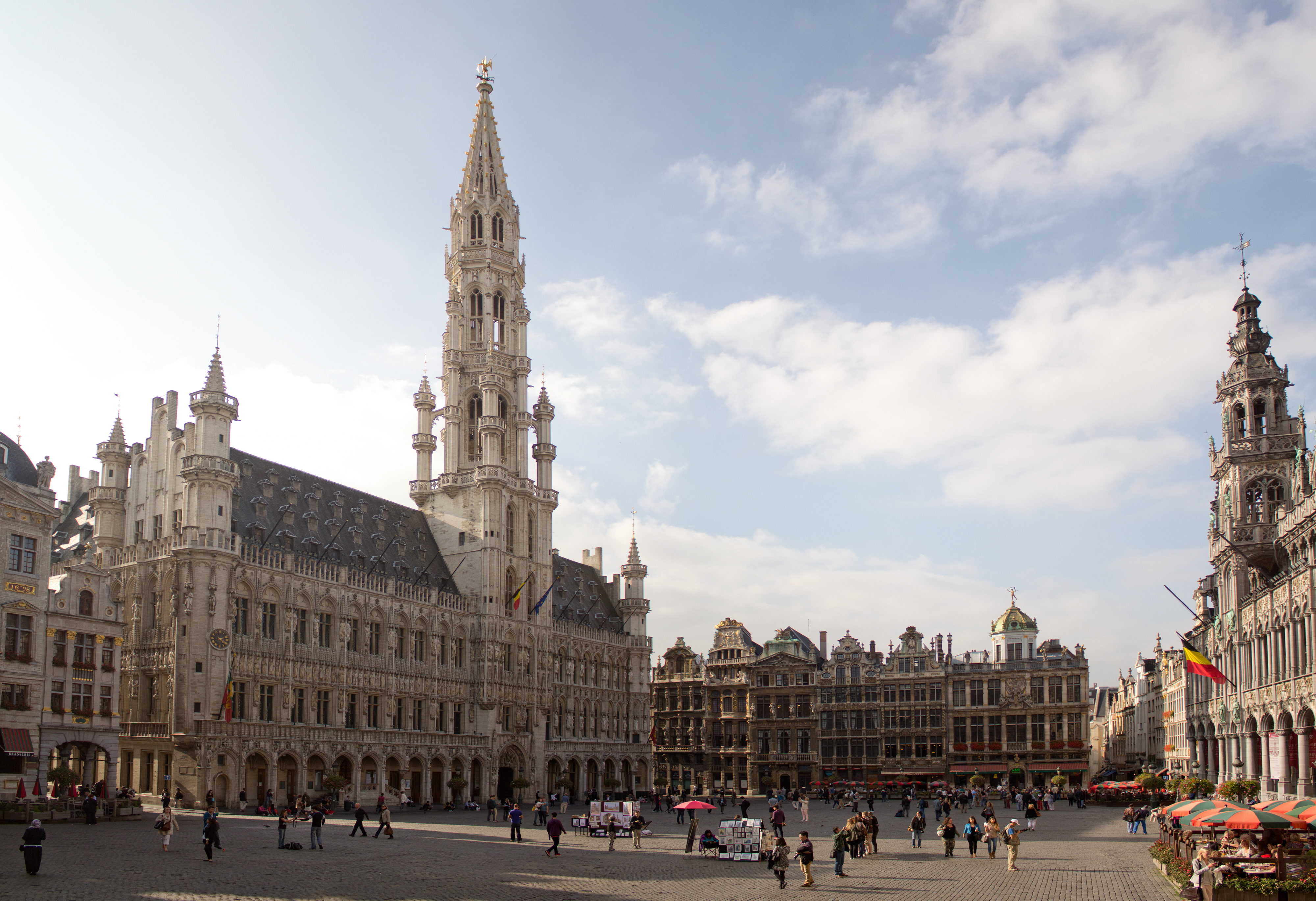 Het stadhuis van Brussel